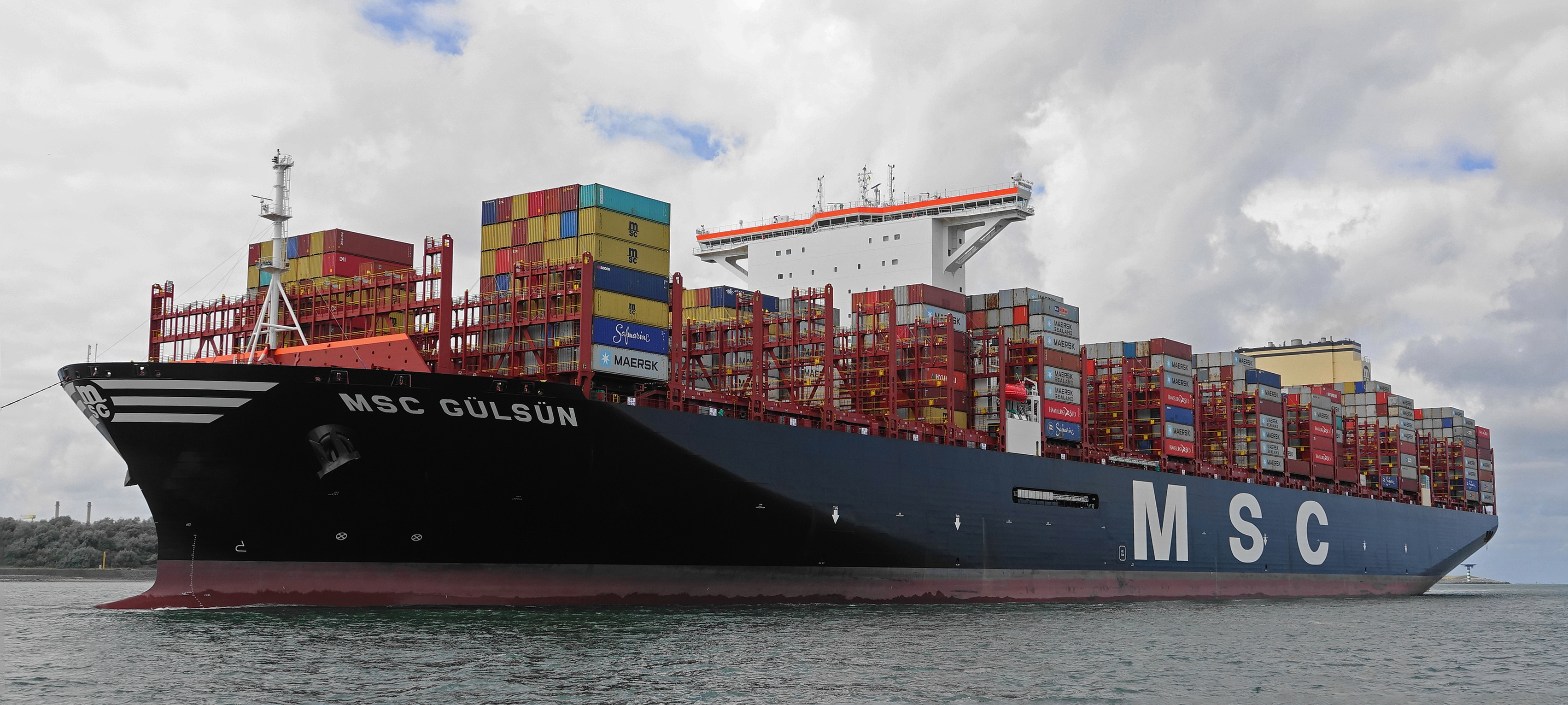 Eerste bezoek aan Rotterdam van het grootste containerschip ter wereld de MSC GÜLSÜN 23.756 TUE , gezien vanaf de Nieuwe Maze 3-9-2019